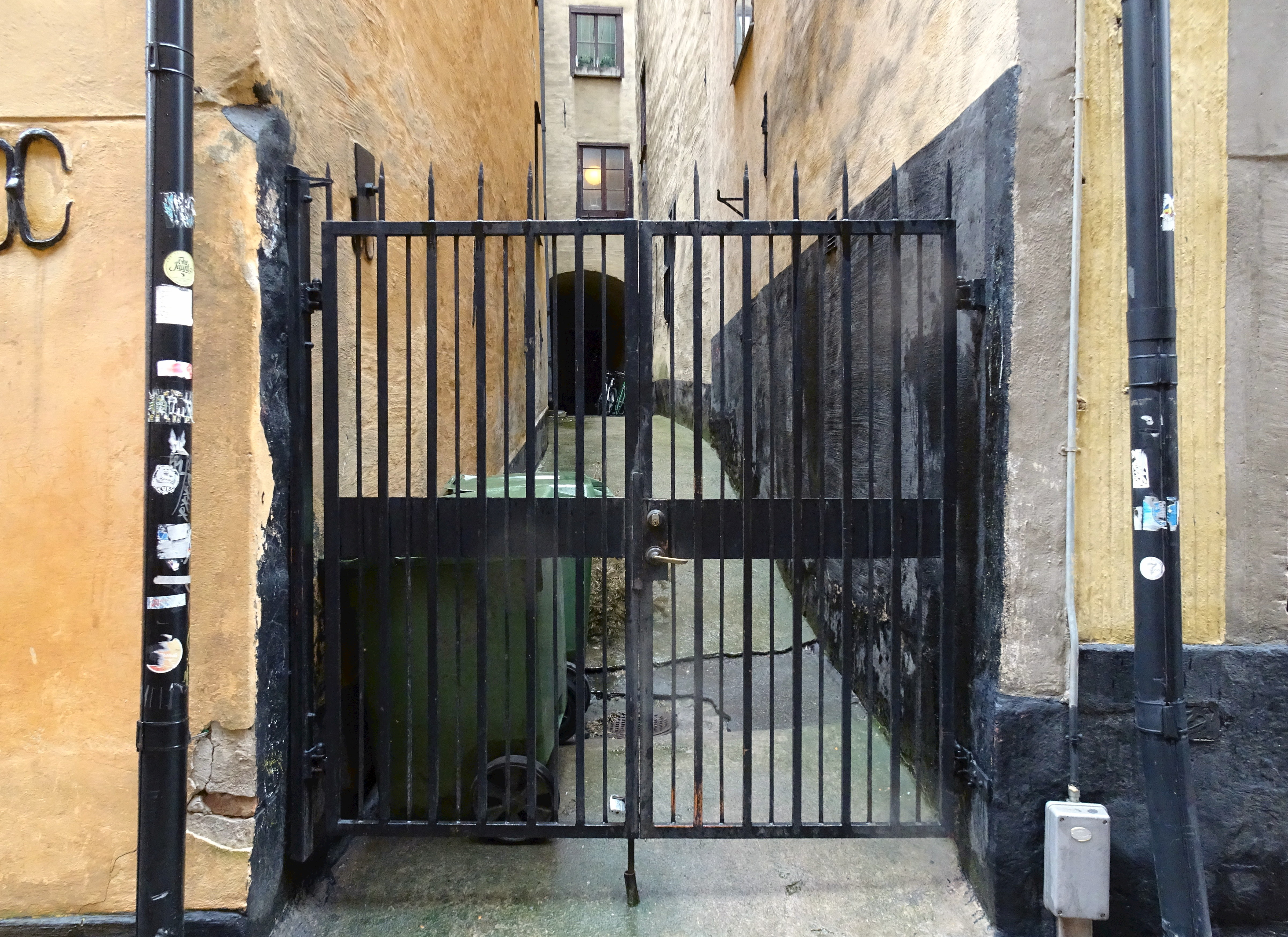 Kvarteret Hippomenes, Prästgatan, igenstängd gränd